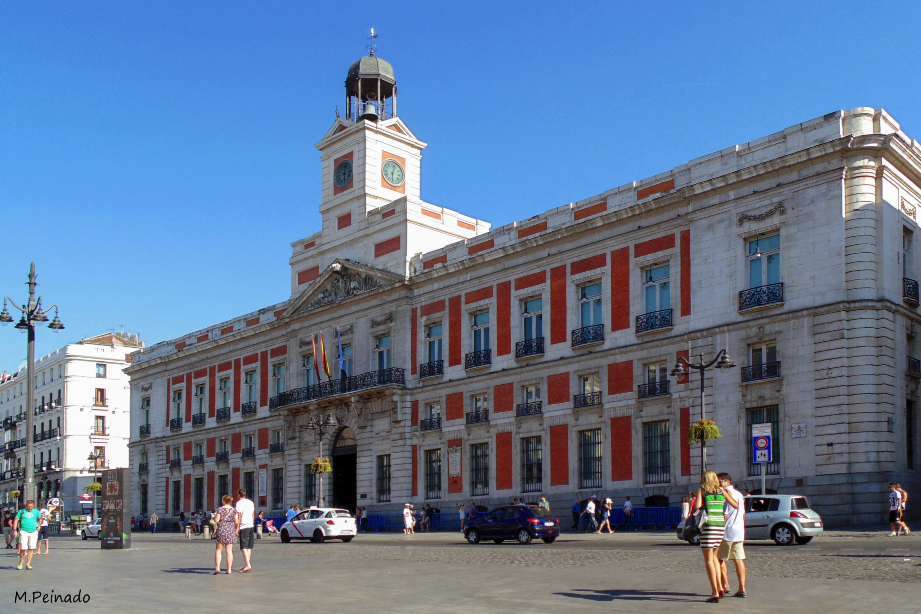 Real Casa de Correos, sede del Gobierno de la Comunidad de Madrid Puerta del Sol. Madrid. Comunidad de Madrid. España